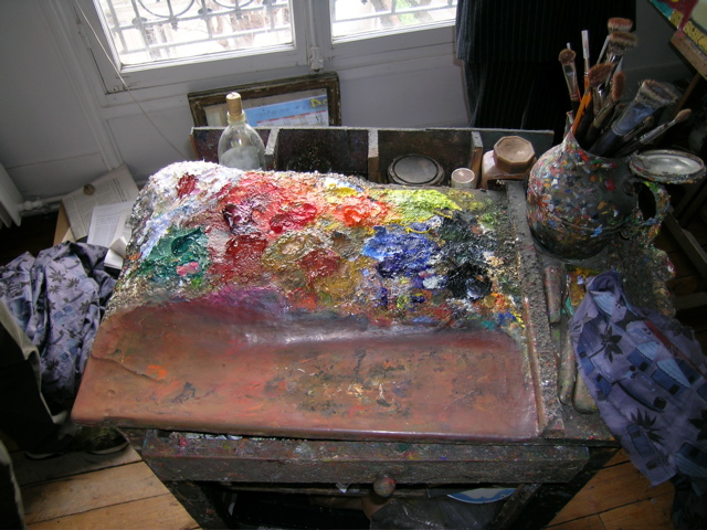 La palette de Georges Arditi, artiste peintre. 2003. Photo de Dominique Antony